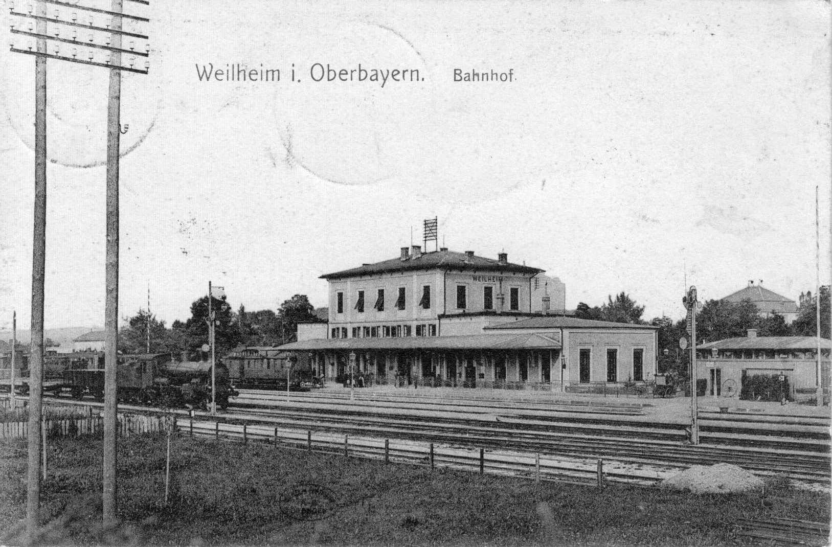 Bahnhof Weilheim: Altes Empfangsgebäude auf einer Ansichtskarte